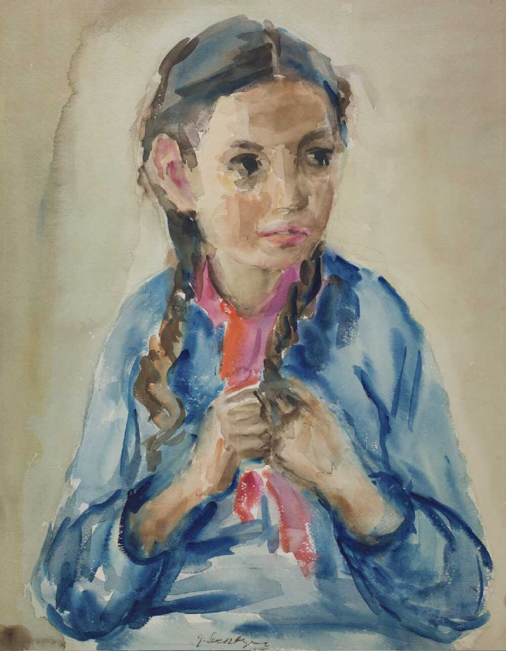 דיוקן של ילדה